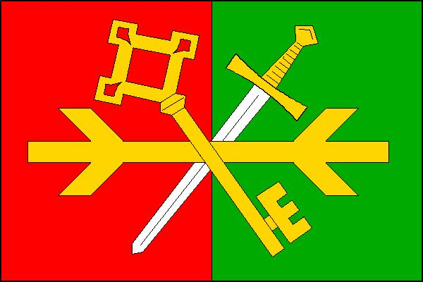 Vlajka obce Libkov (okres Chrudim)